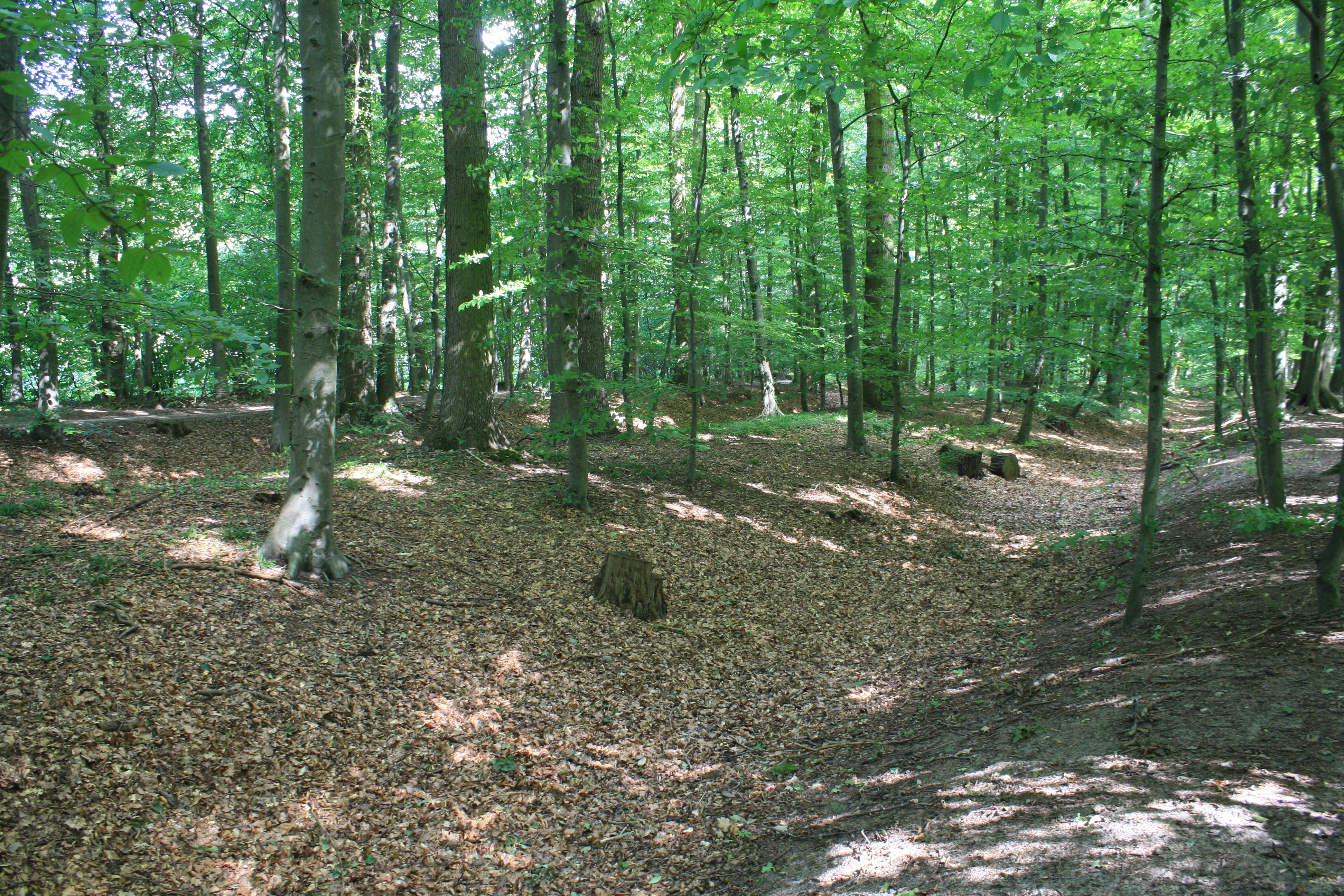 Lüneburger Landwehr südwestlich von Bardowick